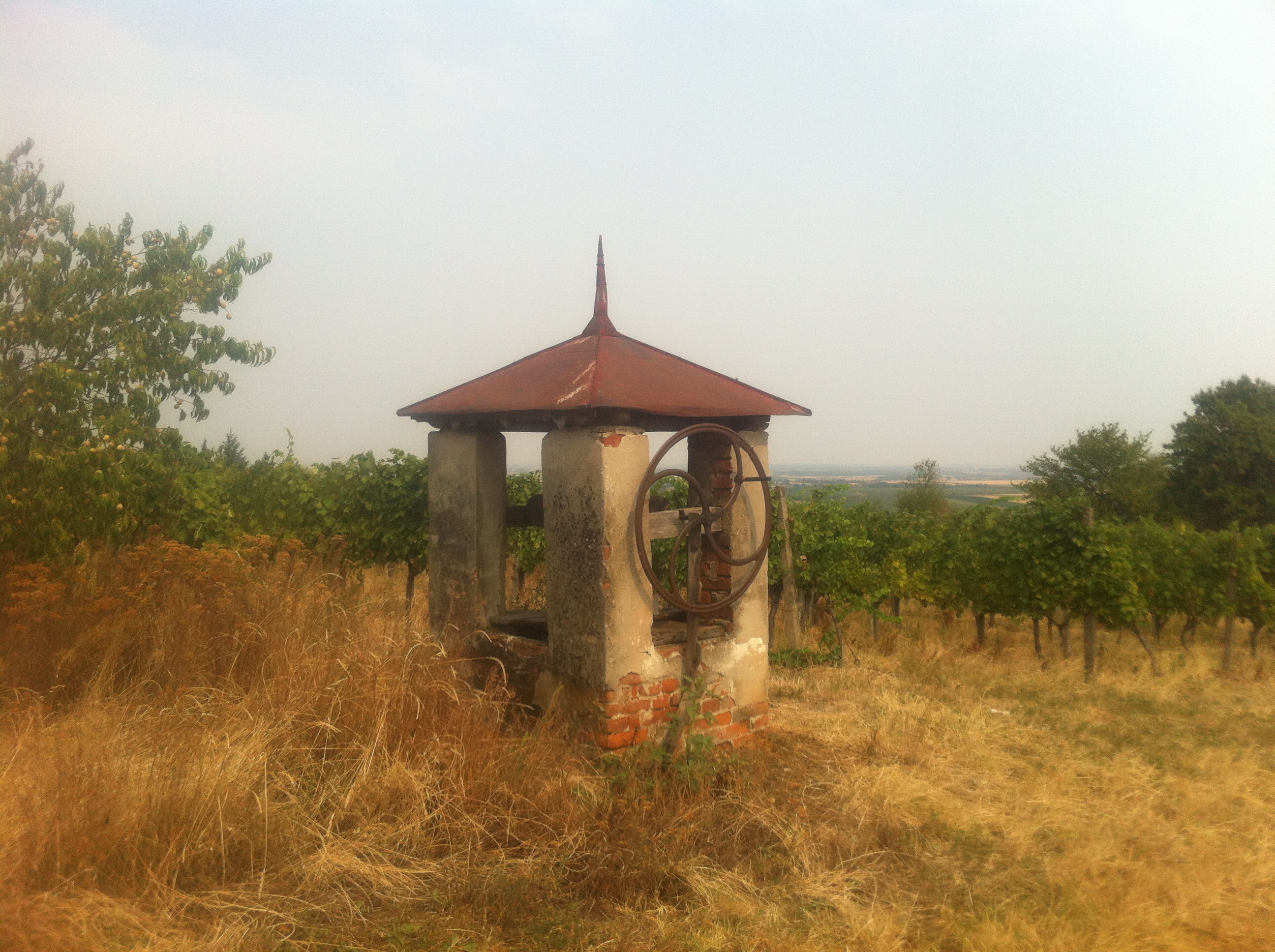 Mandićevac, Croatia